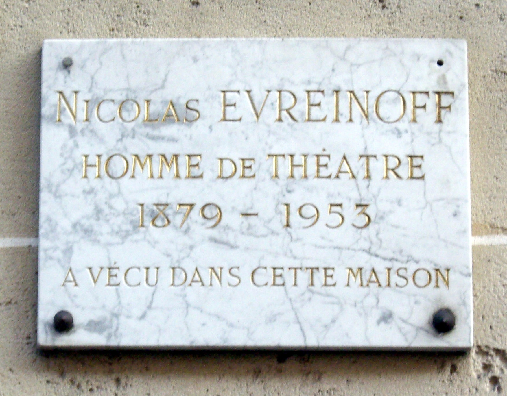 Plaque apposée au n° 7 de la rue Boileau, Paris 16e, où vécut l'homme de théâtre Nicolas Evreinoff [Nikolai Evreinov] (1879-1953).